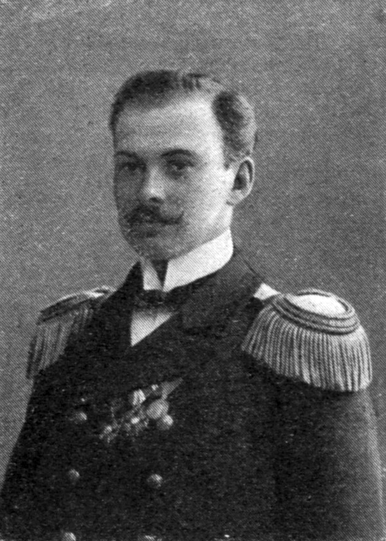 Капитан 2-го ранга Н.М. Белкин, погибший во время крушения подводной лодки "Камбала" в Чёрном море